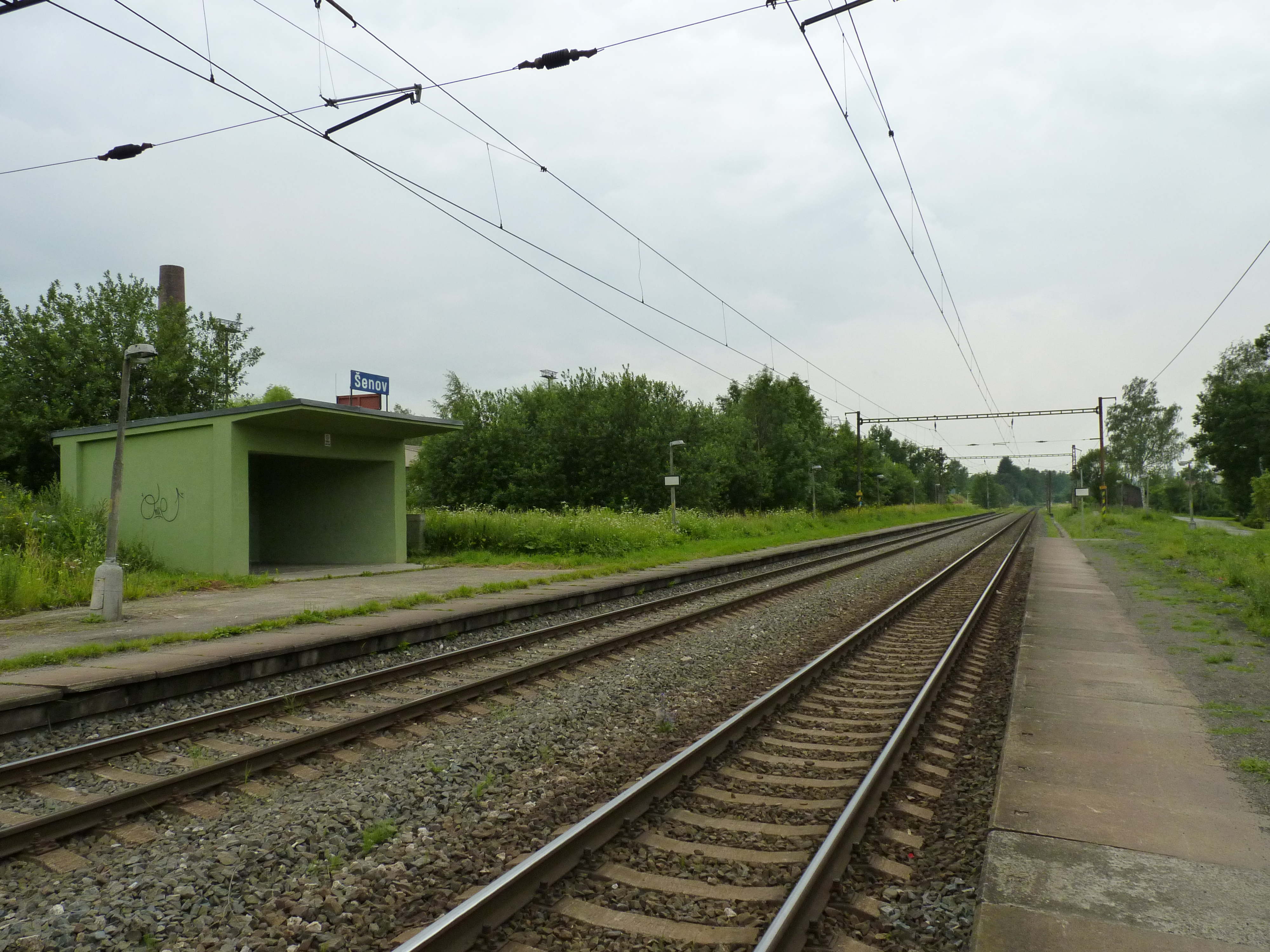 Vlaková zastávka. Šenov, Moravskoslezský kraj.